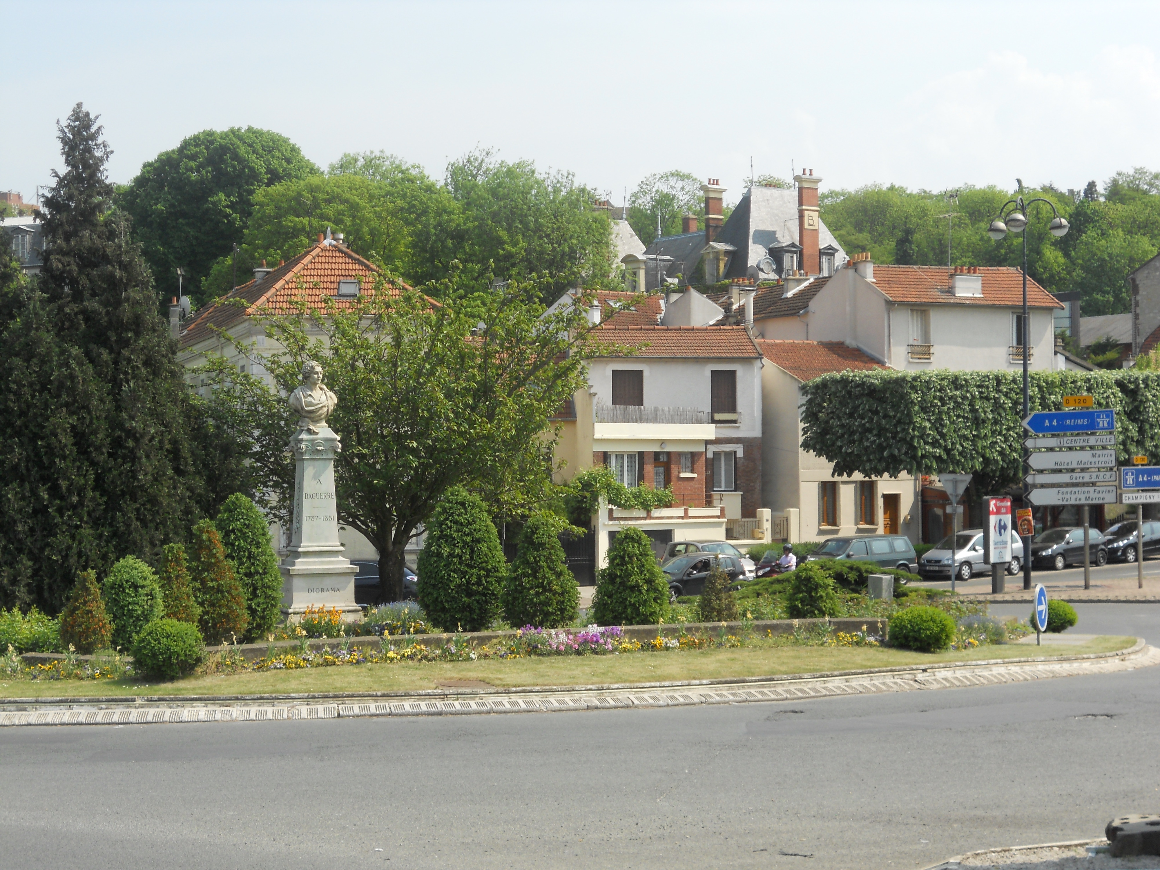 Bry-sur-Marne (France): monument à Louis Daguerre, à l'entrée de la ville après le Pont de Bry. Bry-sur-Marne (France): monument to Louis Daguerre.